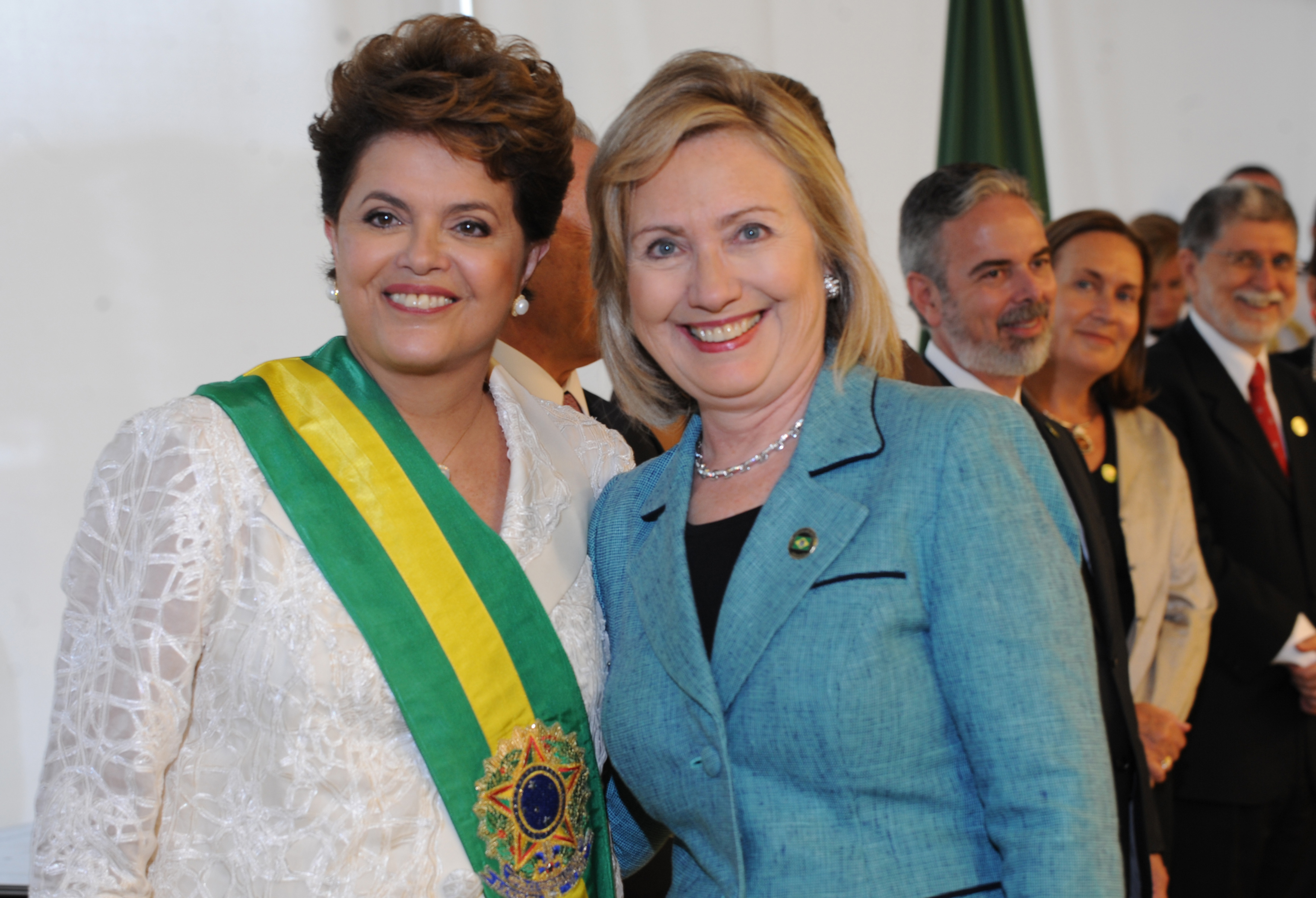 Dilma Rousseff, presidenta do Brasil, e Hillary Clinton, secretária de Estado dos Estados Unidos. Brasília, 1º de janeiro de 2011.